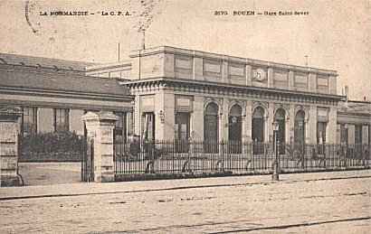 Gare de Saint Sever, Rouen.